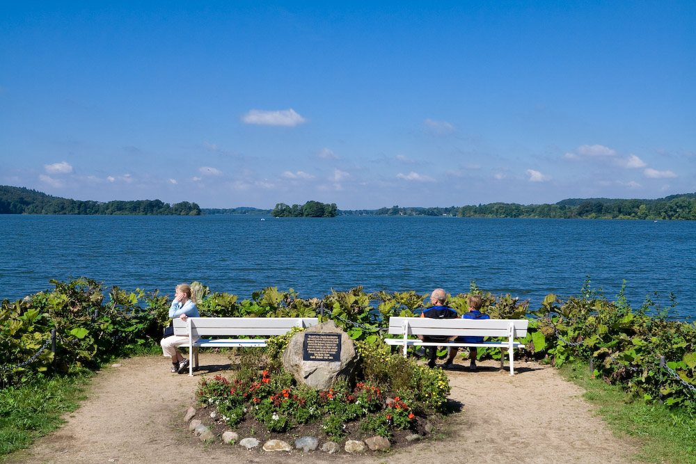 Blick auf den Dieksee in Malente